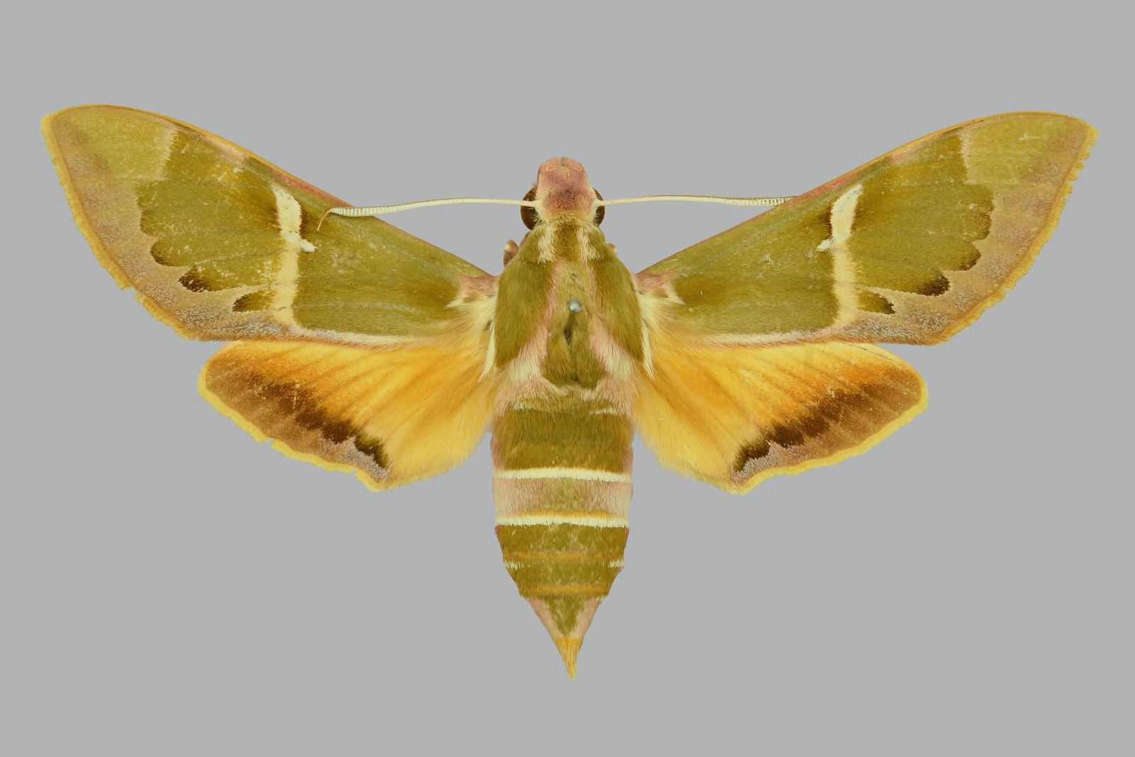 Rethera komarovi rjabovi, female, upperside. Iran, Shiraz